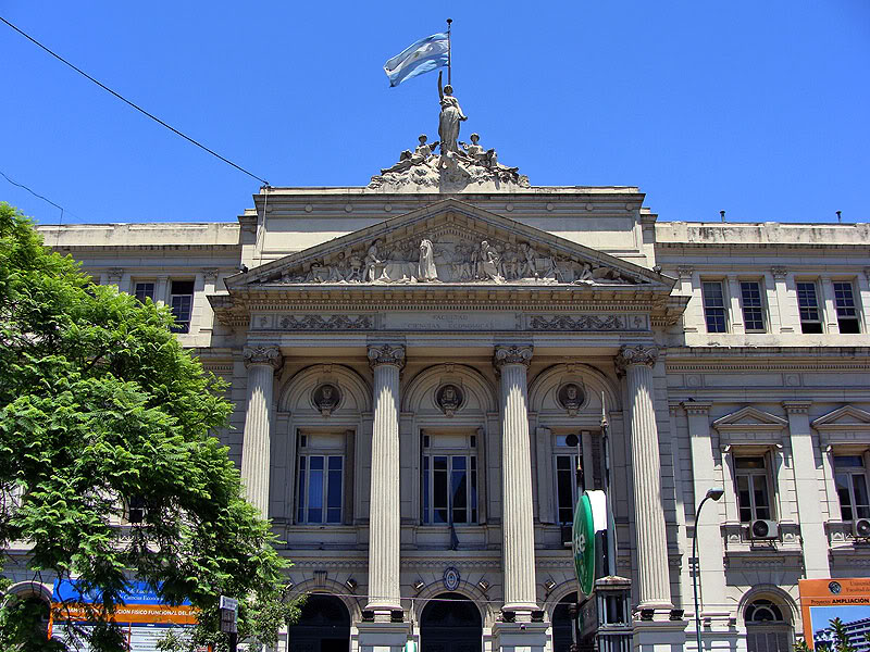 Facultad de Cs. Economicas UBA